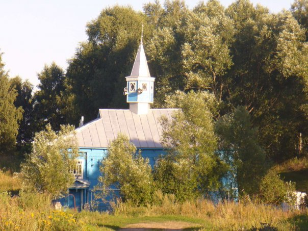 Мечеть в селе Анда Сергачского района Нижегородской области, Россия.